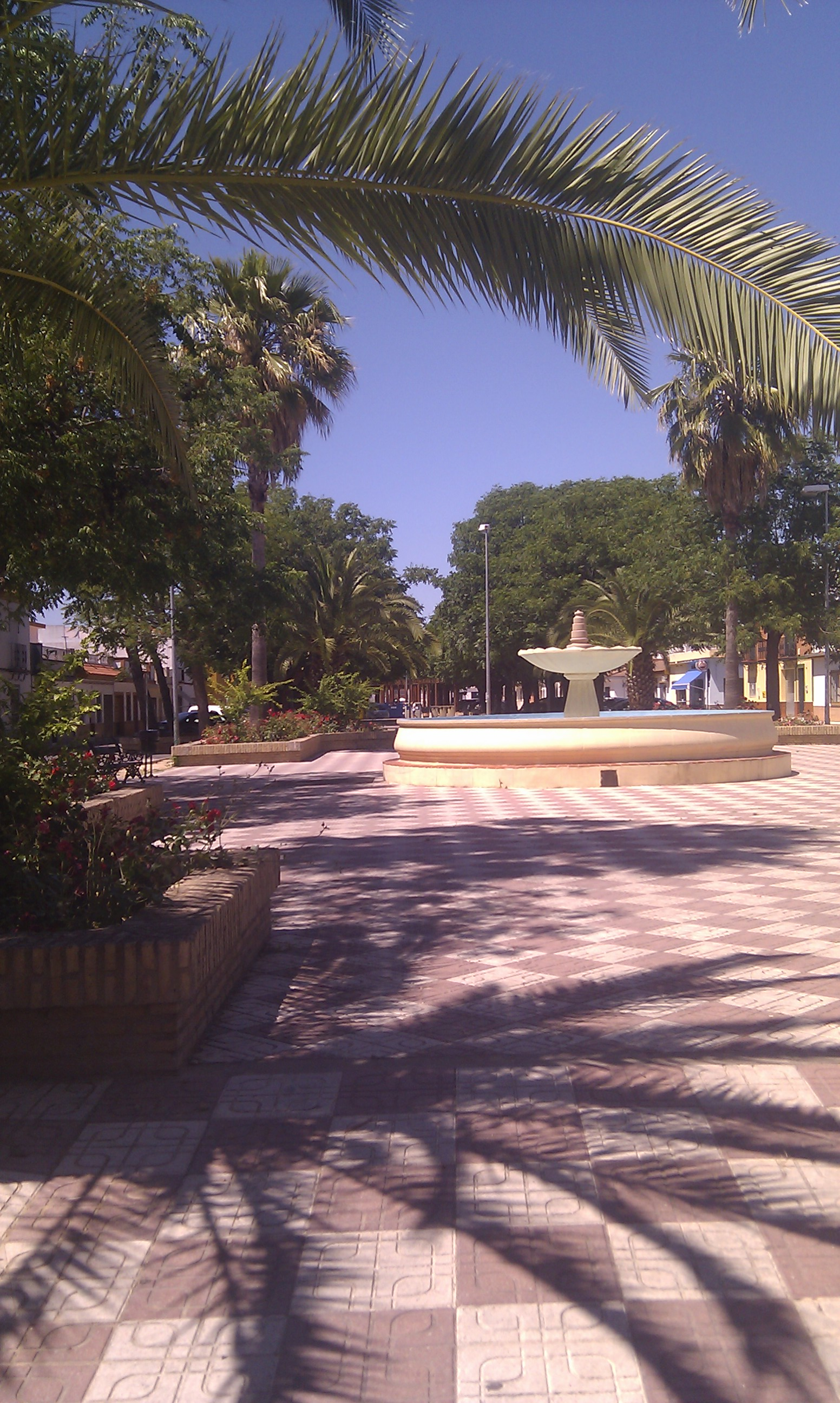 Conocida plazoleta en la calle Reina Sofía